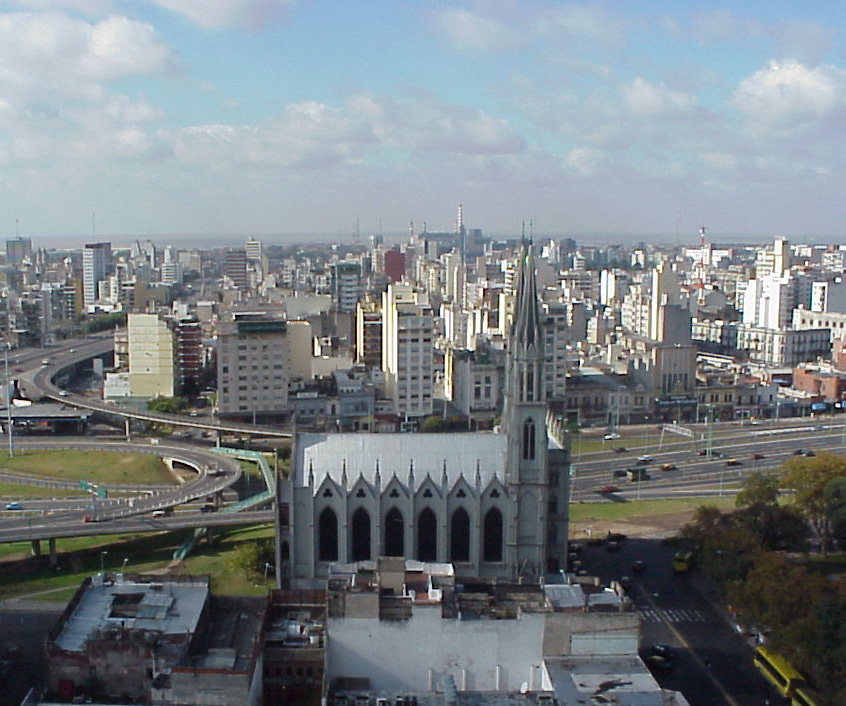 Iglesia del Inmaculado Corazón de María (Buenos Aires), frente a la Plaza Constitución, Constitución 1077